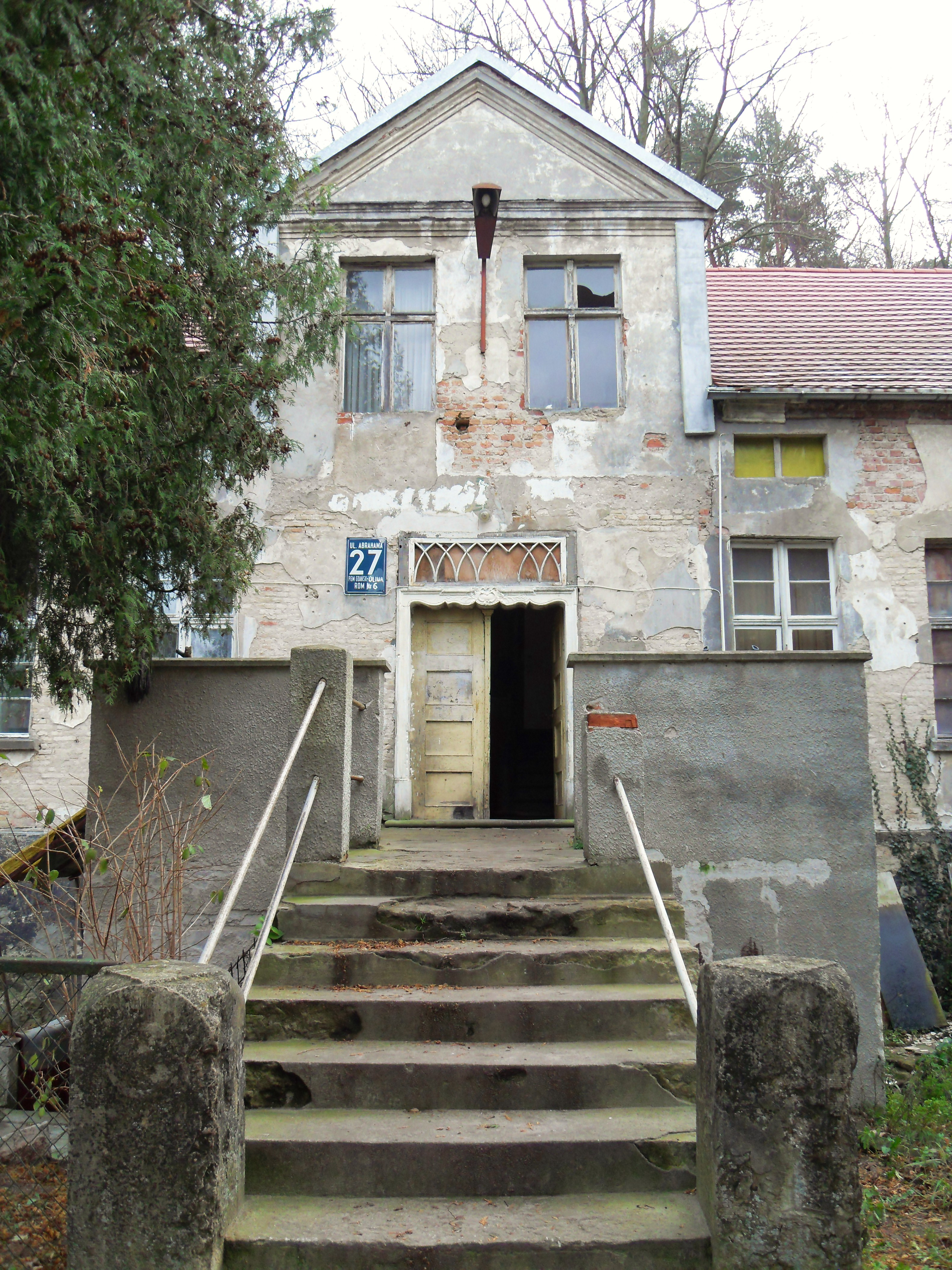 Gdańsk VII Dwór, ul. Abrahama 27. Budynek z kompleksu VI Dworu.